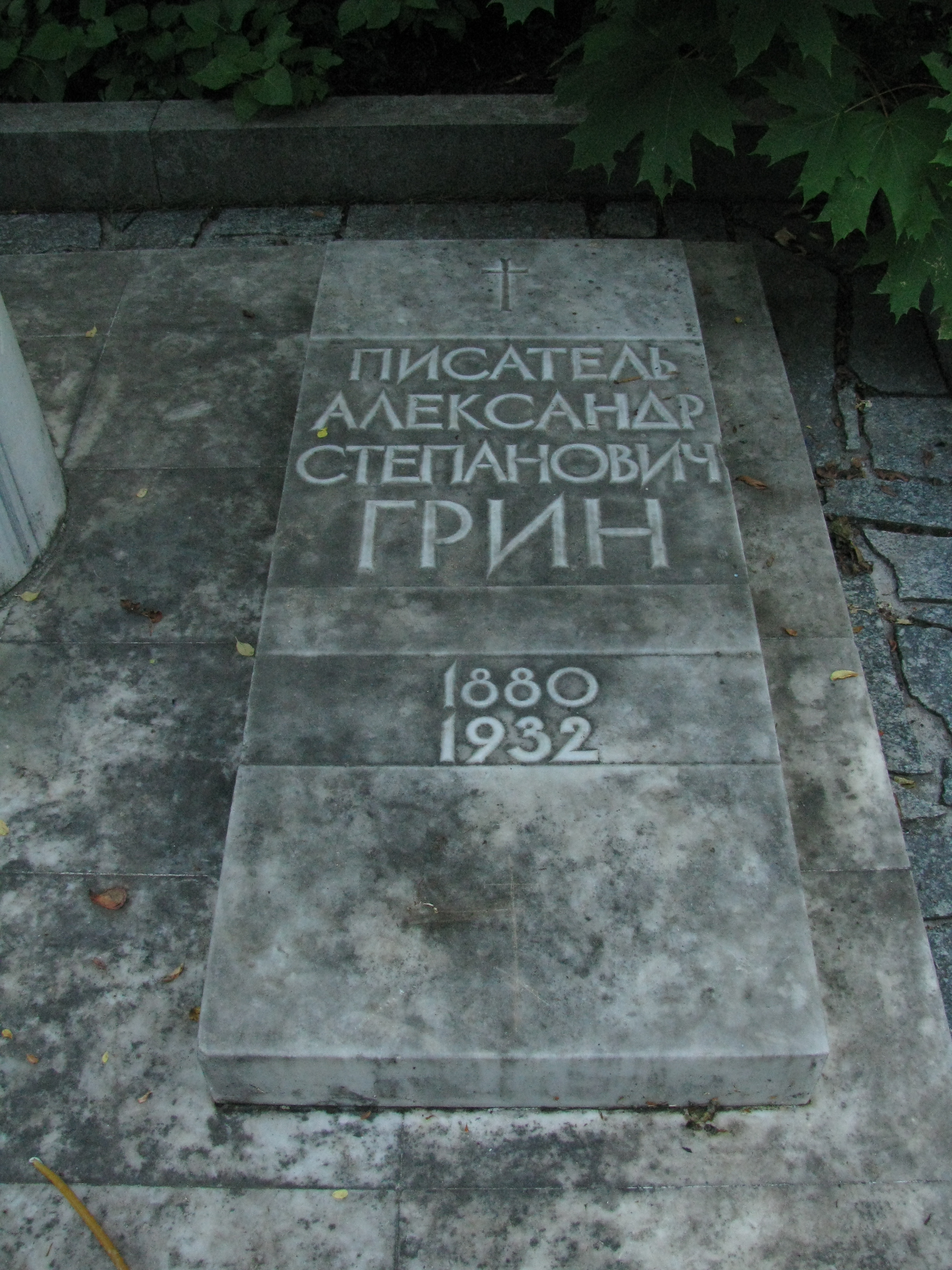 Могила О.С. Гріна